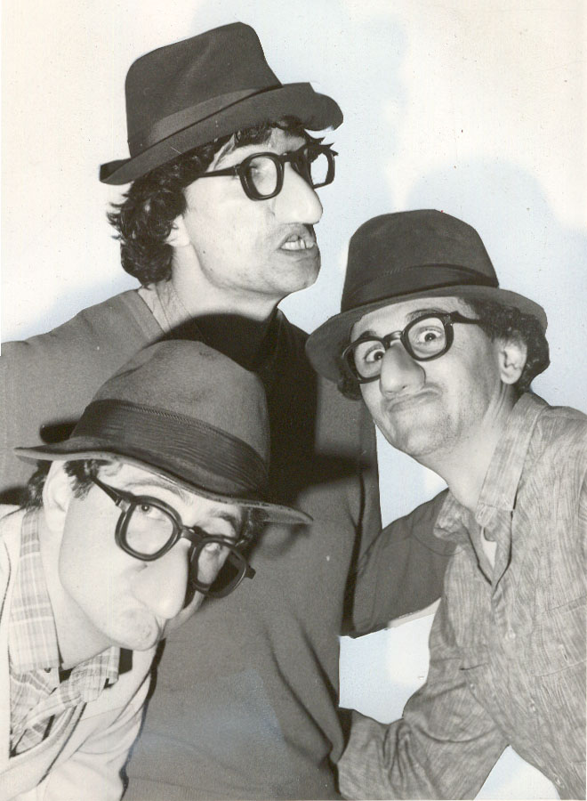 Gomaespuma.